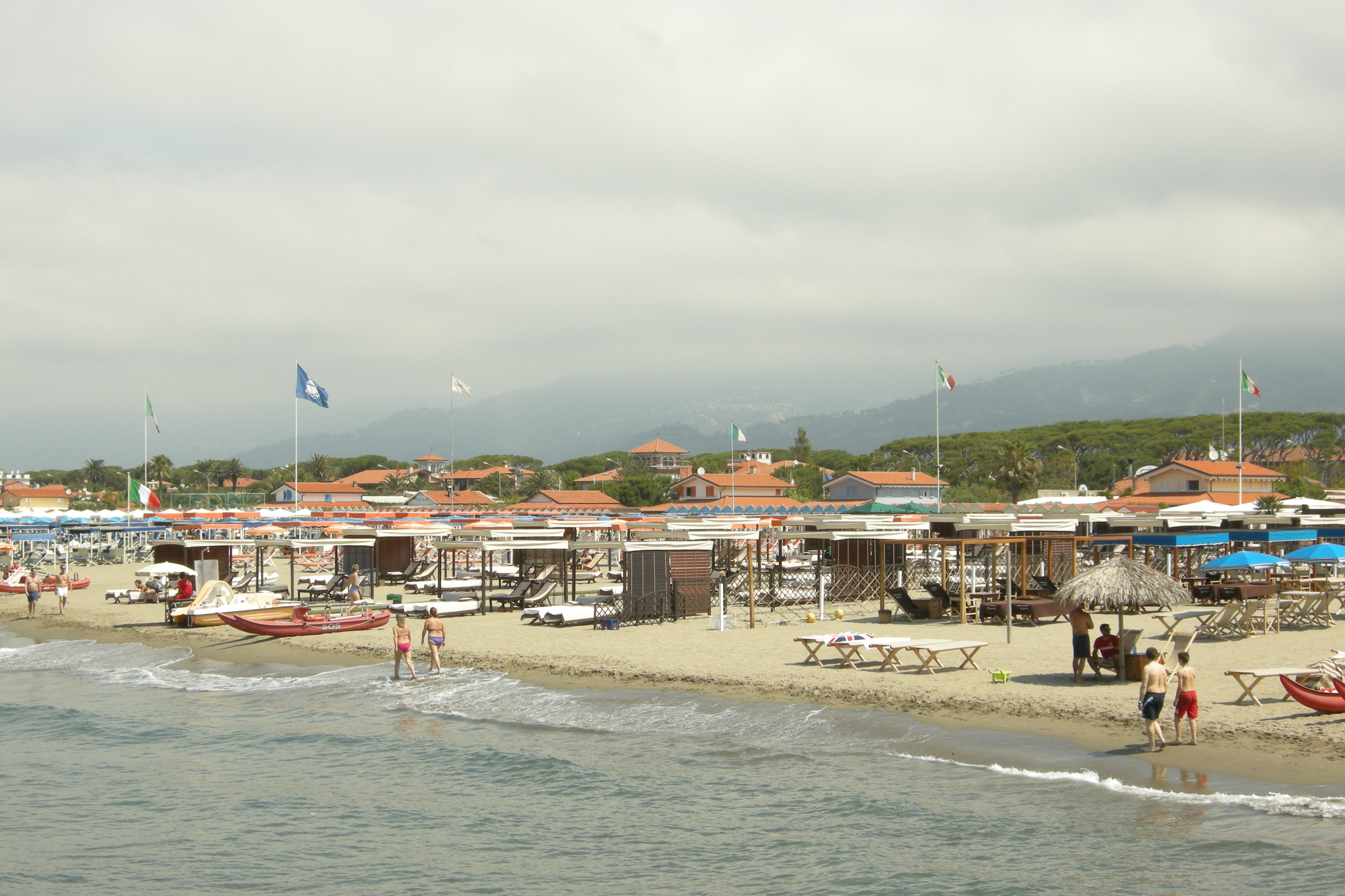 Форте дей Марми, пляж